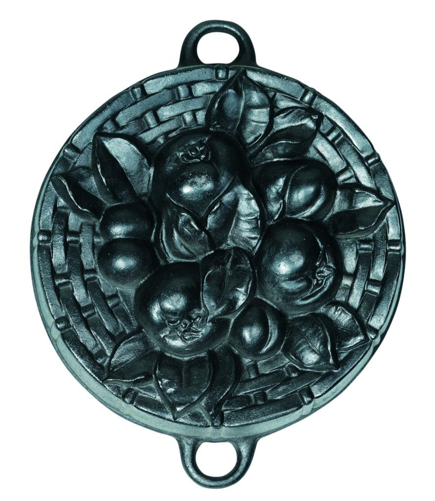 Dekorativní pečící forma - Buzuluk a.s.